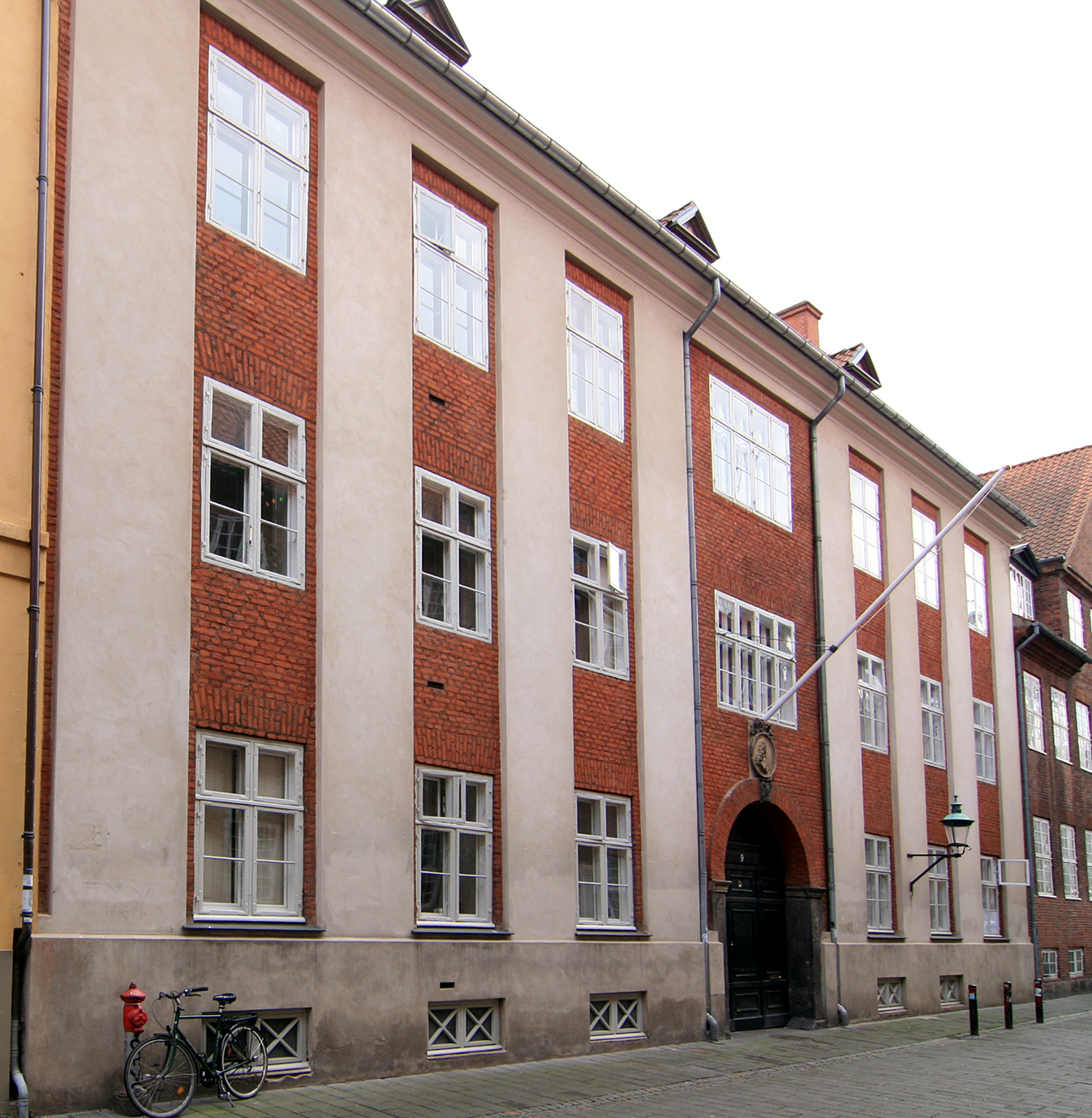 Elers' Kollegium, Store Kannikestræde 9, København.